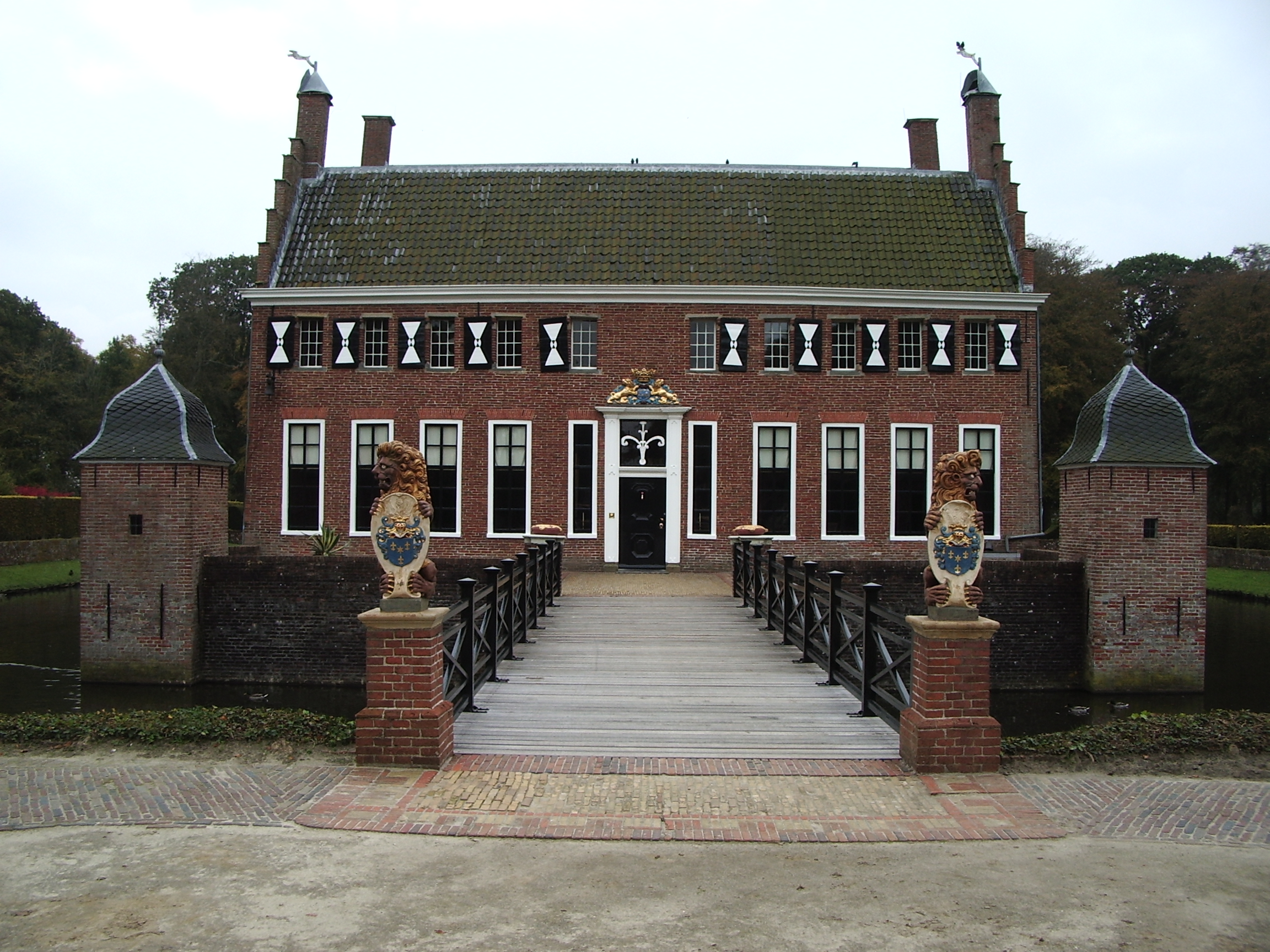 Foto 171004 Menkemaborg M ter Wiel Categorie:Afbeelding borg